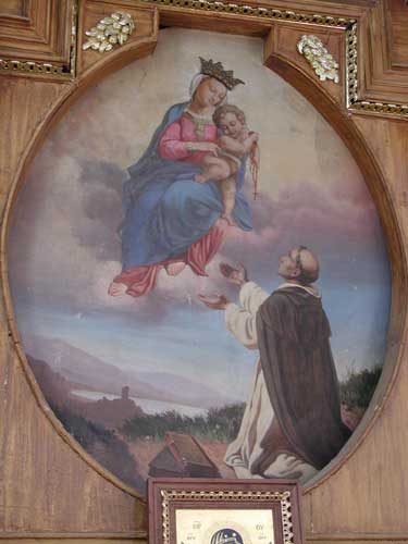 Уручэнне ружанца святому Дамініку. XIХ ст., в. Воўпа, Ваўкавыскі р-н